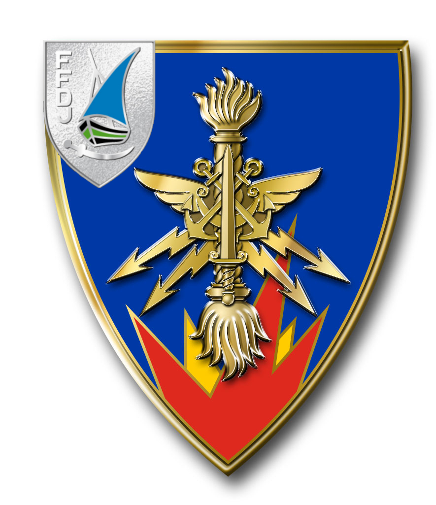 Insigne du GMu Djibouti